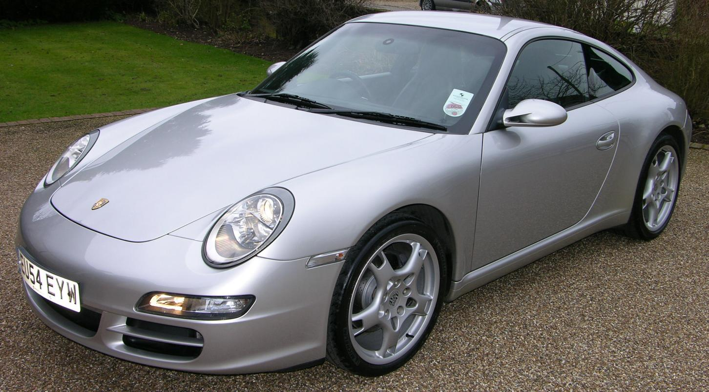 Porsche 911 (997) Carrera